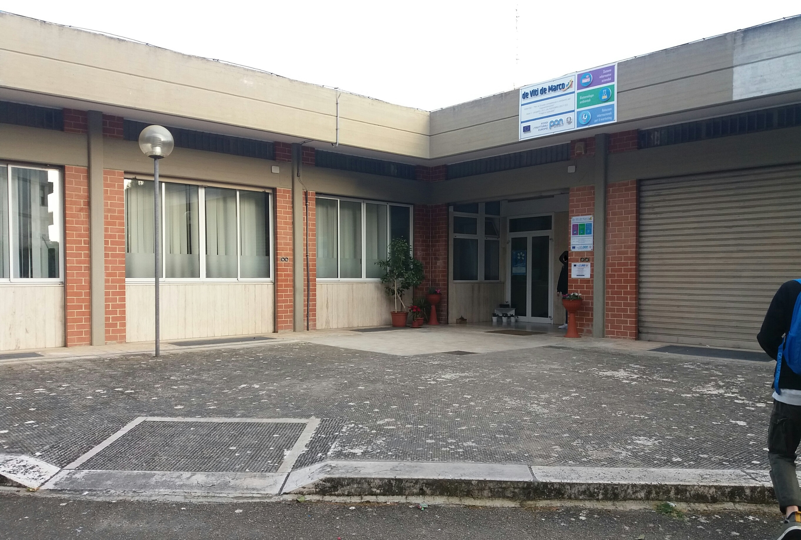 sede ITET de Viti de Marco (biotecnologico)